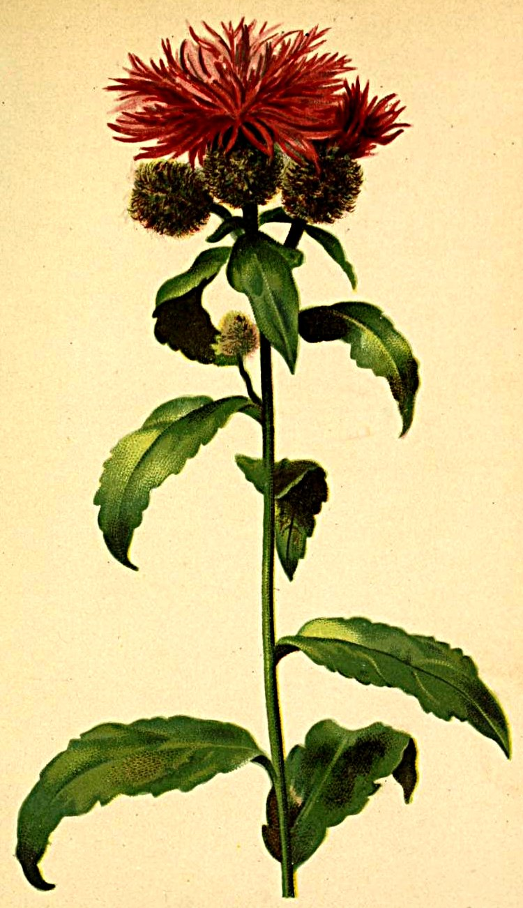 Centaurea phrygia